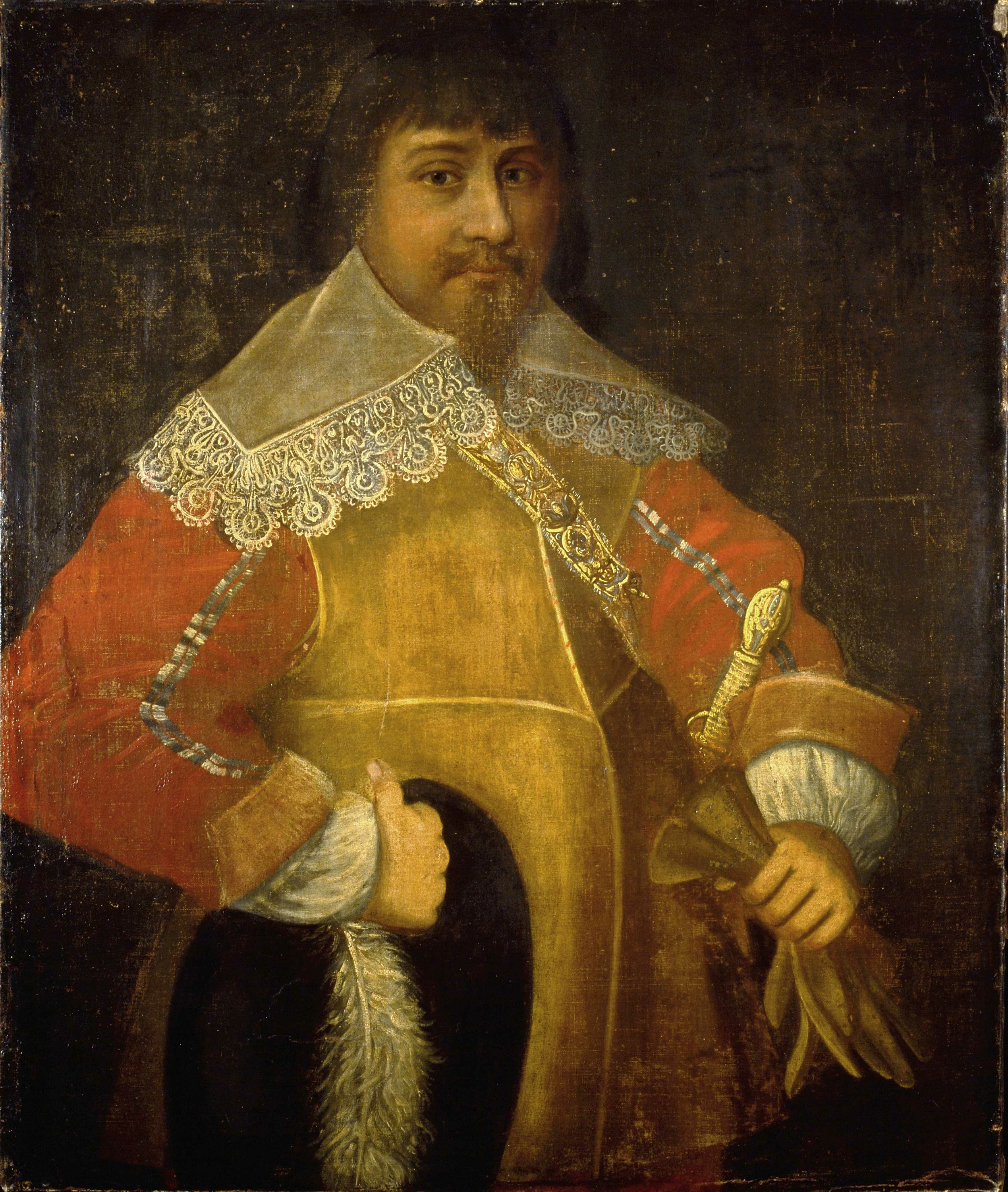 Portrett av Selius Marselis (1600-1663), generalpostmester i Norge.